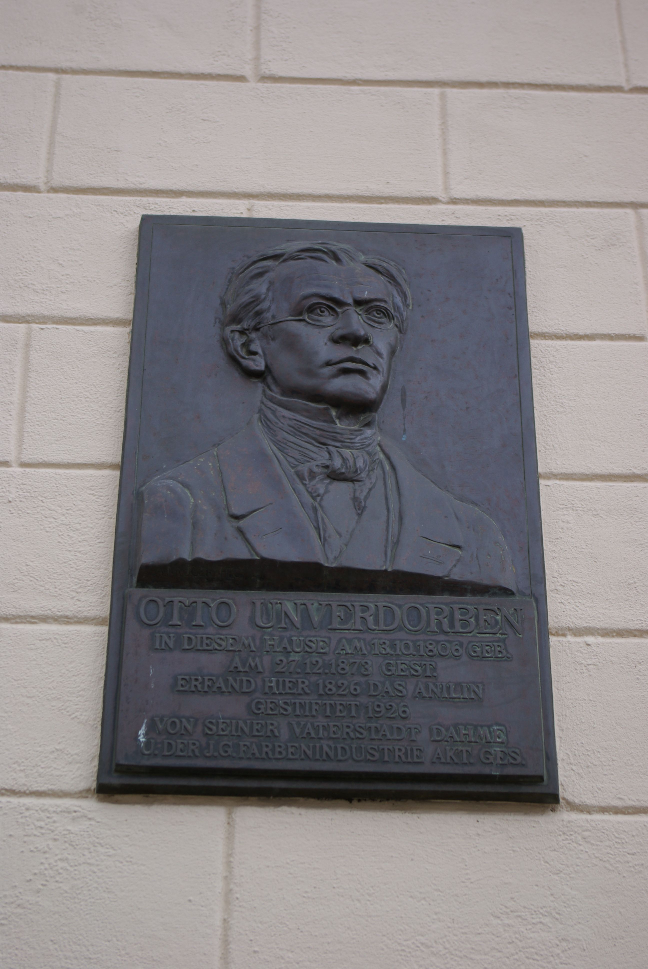 Dahme/Mark in Brandenburg. Die Gedenktafel an Otto Unverdorben am Haus Hauptstraße 46/47. Unverdorben hat 1826 das Anilin in diesem Haus erfunden.